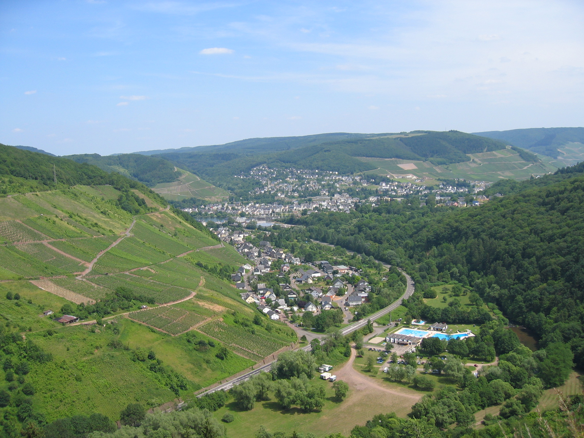 Alf (Mosel) mit Alfer Schwimmbad